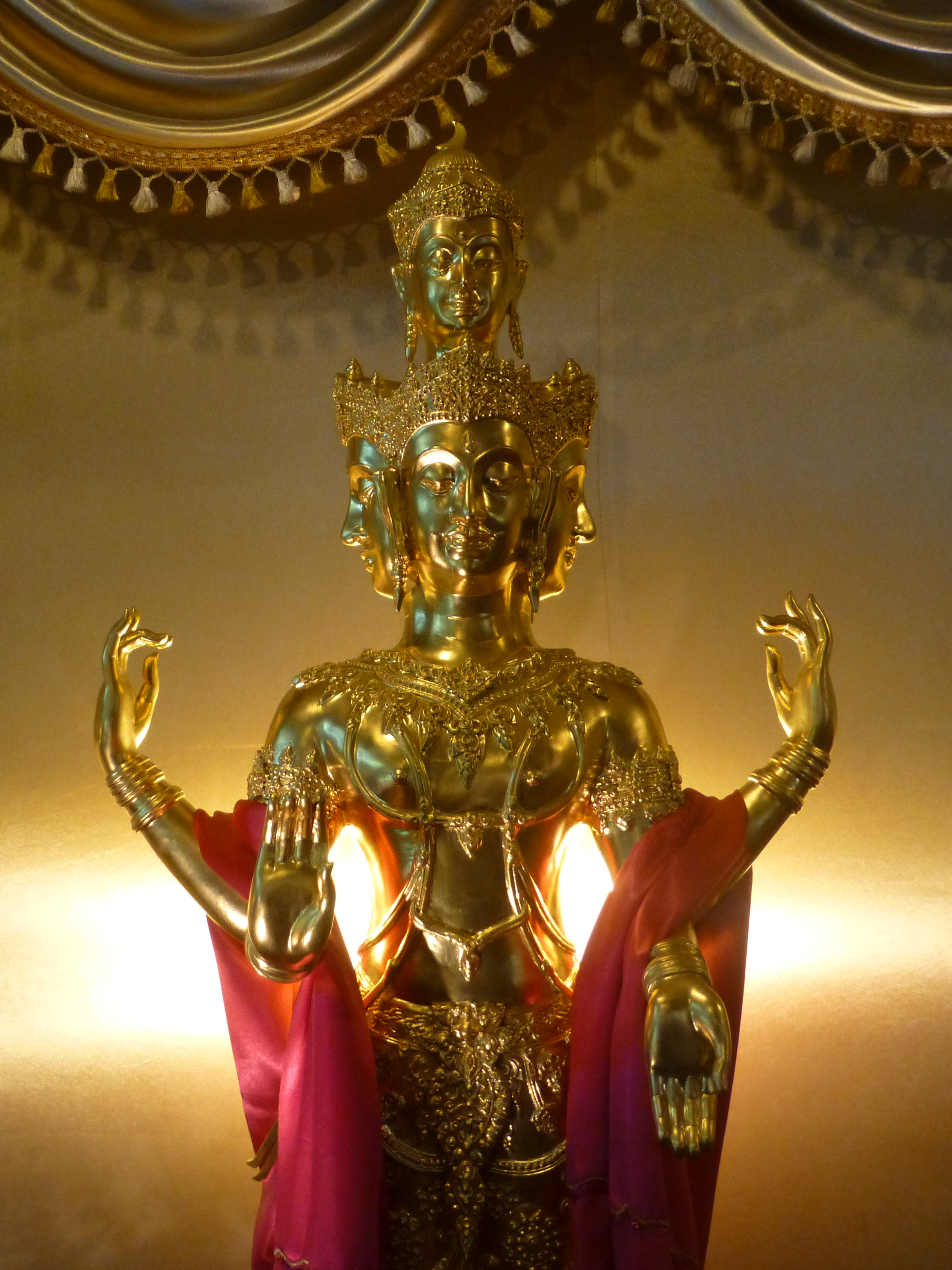 007 Brahma, Wat Yannava, Bangkok, Thailand Photograph from Wat Yannawa in Bangkok, Thailand taken by Anandajoti.